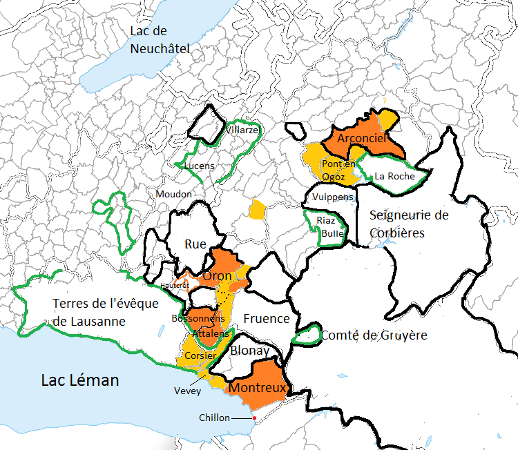 Carte des possessions de la famille d'Oron. Les lieux dans lesquels les membres de la famille ont des droits partiels sont en orange clair.